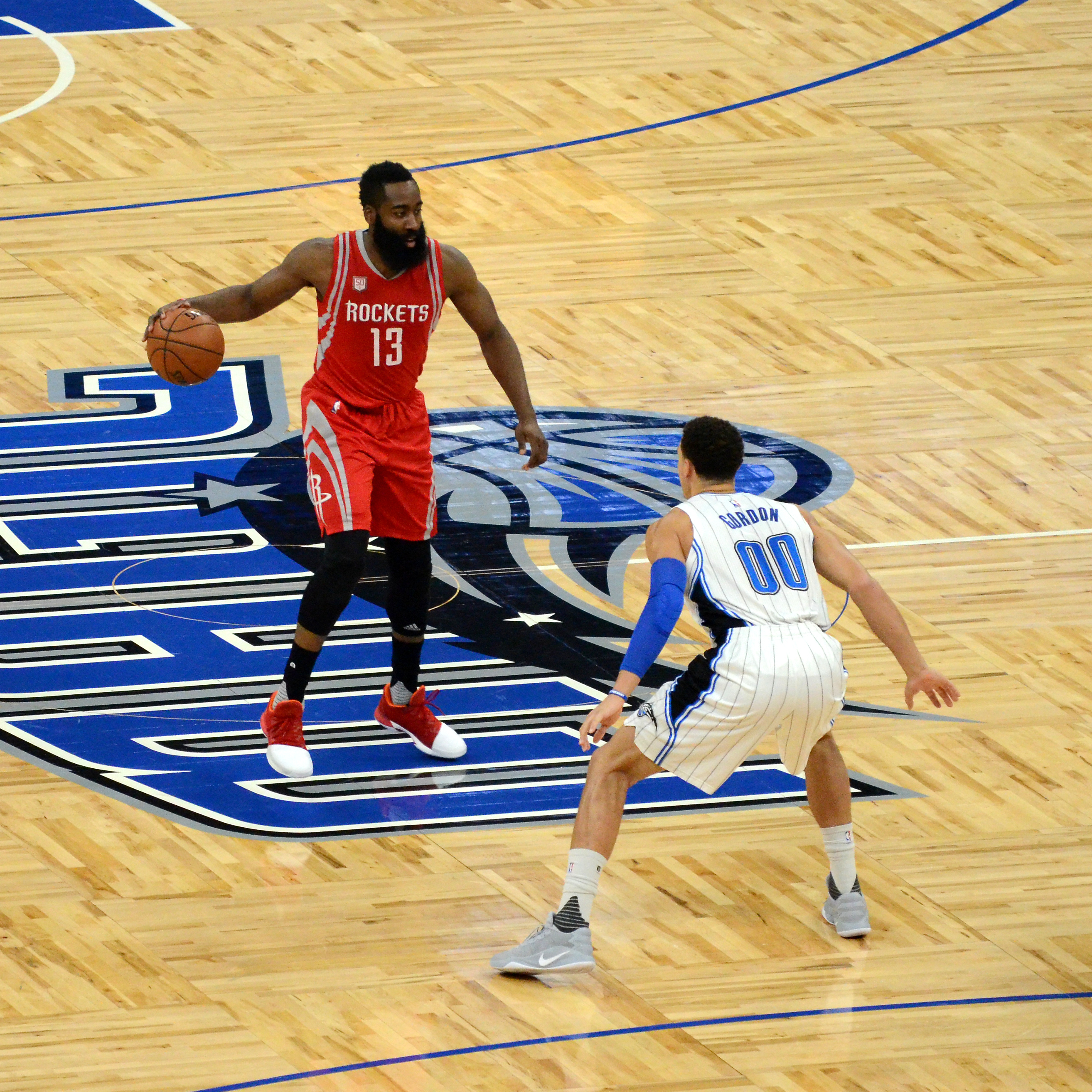 James Harden And Aaron Gordon